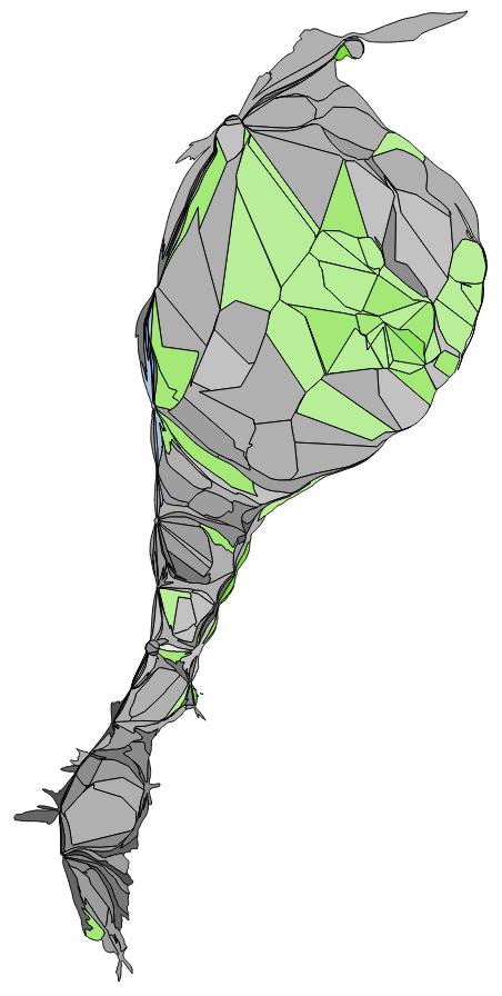 中文（台灣）: 顏色對照表 部分村里因共用投開票所 故圖中部分村里得票為依人口調整後資料